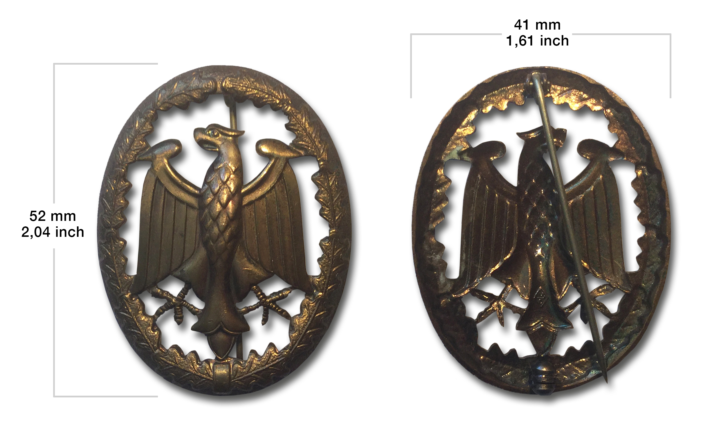 Vorder- und Rückseite des Leistungsabzeichen der Bundeswehr in Bronze, Version von 1983 (mit Maßangaben)